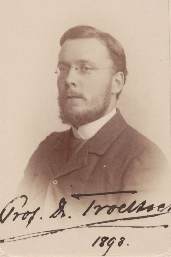 Walter Troeltsch (* 6. Juli 1866 in Mergelstetten; † 23. Februar 1933 in Marburg) war Nationalökonom an der Philipps-Universität Marburg, wo er die wirtschaftswissenschaftliche Seminarbibliothek begründete.